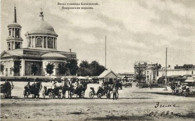 виды станицы Каменской (ныне город Каменск-Шахтинский Ростовской области РФ), Покровский храм